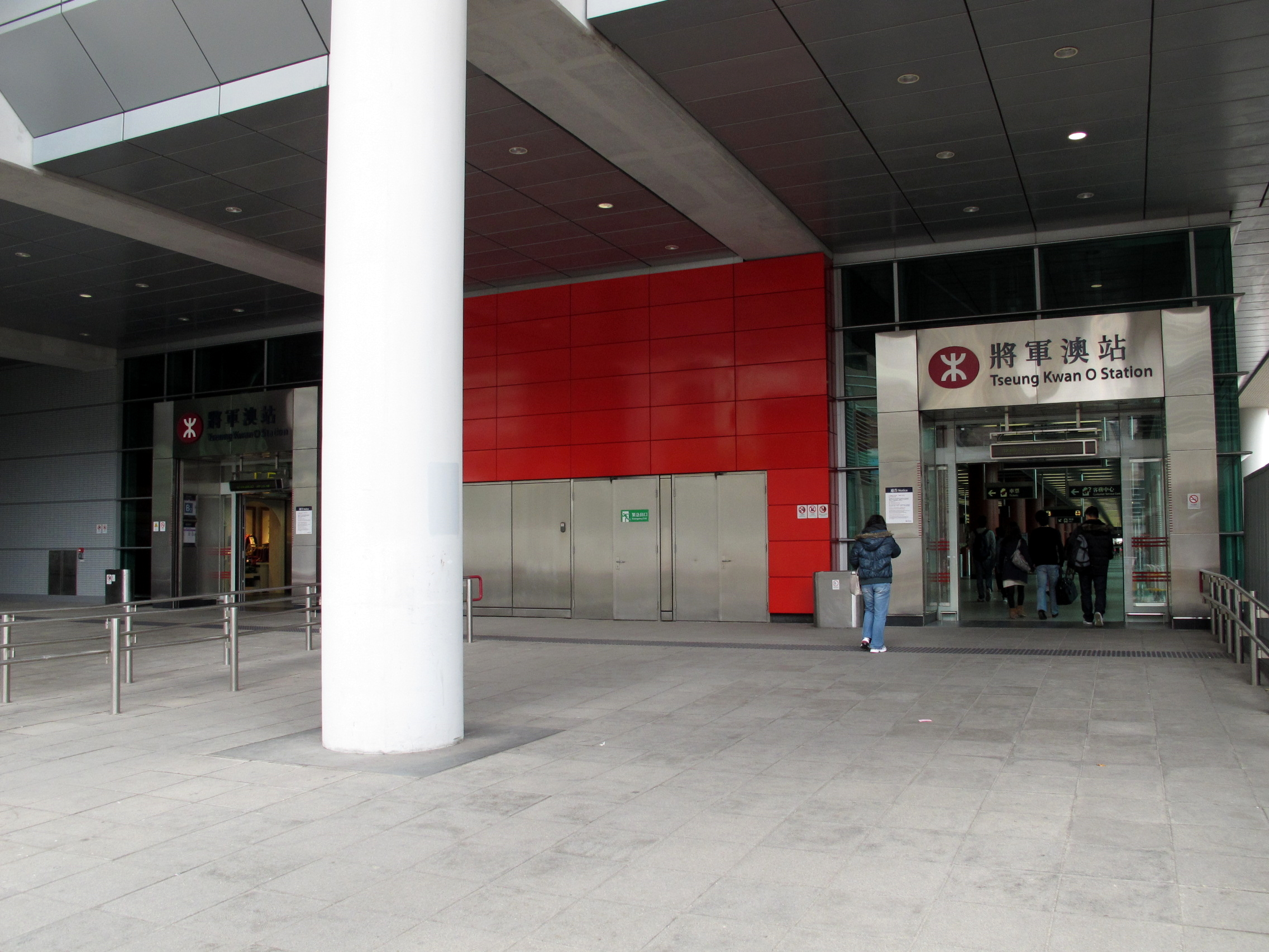 將軍澳站B出口